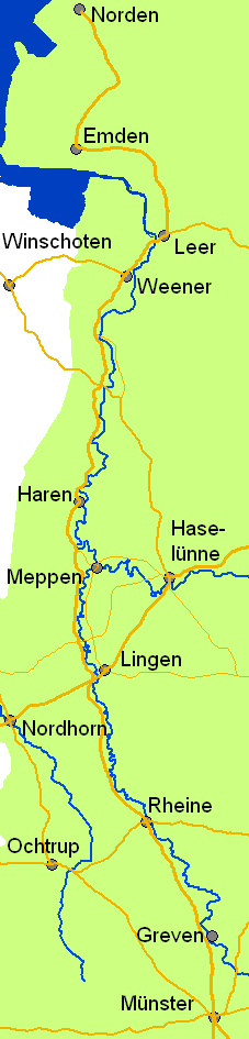 Verlauf der Frisischen Straße